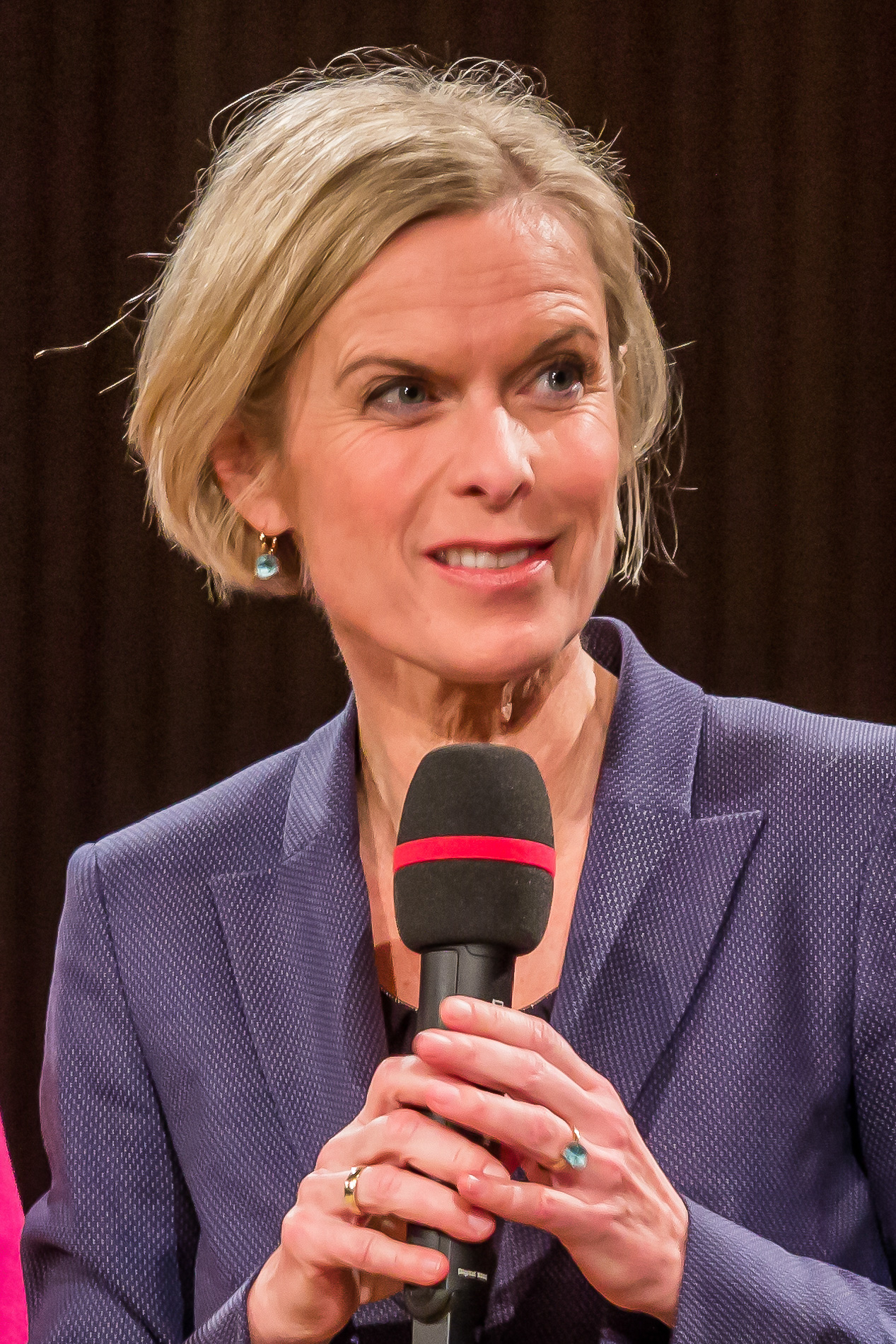 Kathrin Menges, Personal-Vorstand Henkel